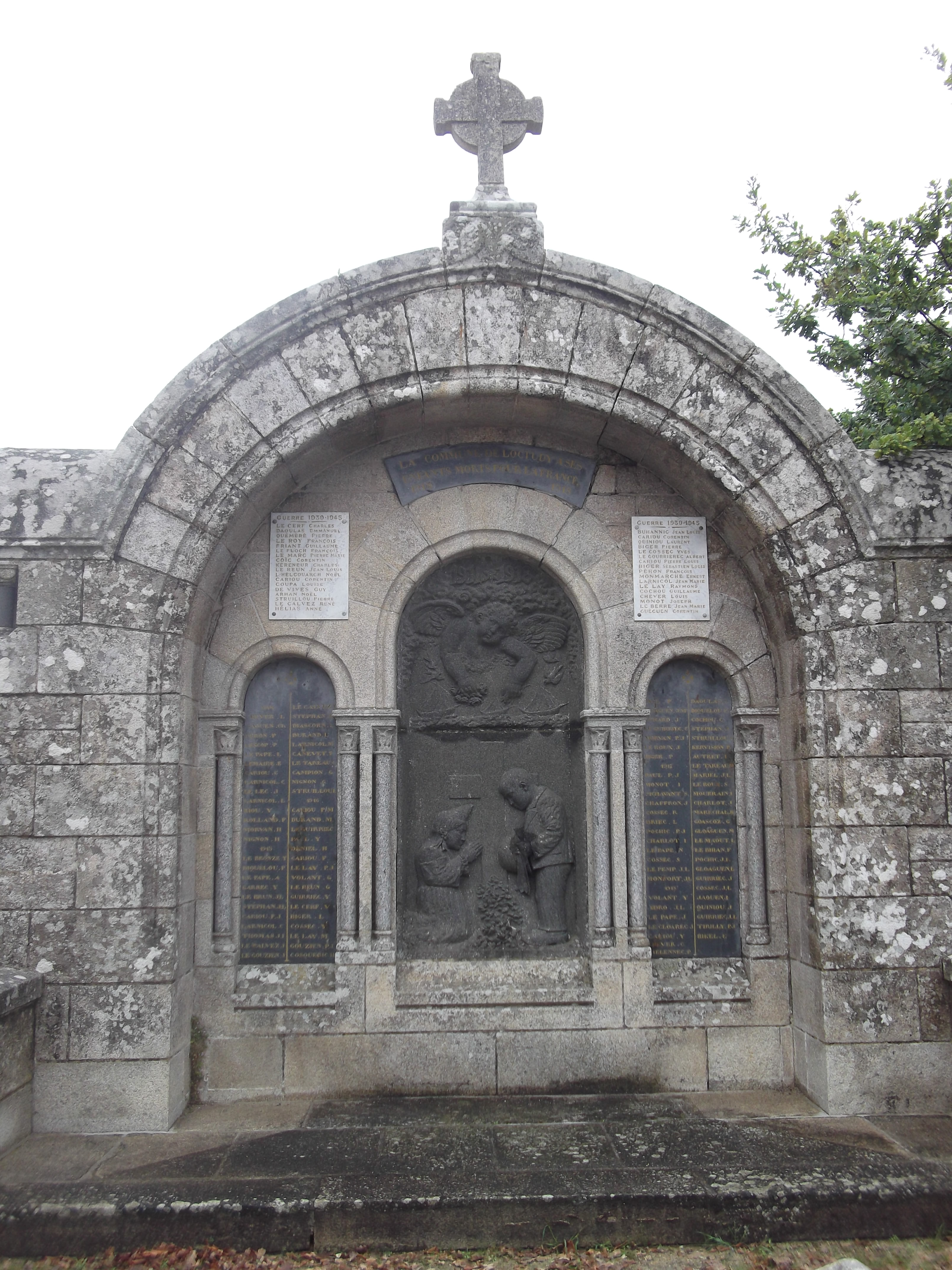 Le monument aux morts de Loctudy (sculpteur : Émile Bickel)